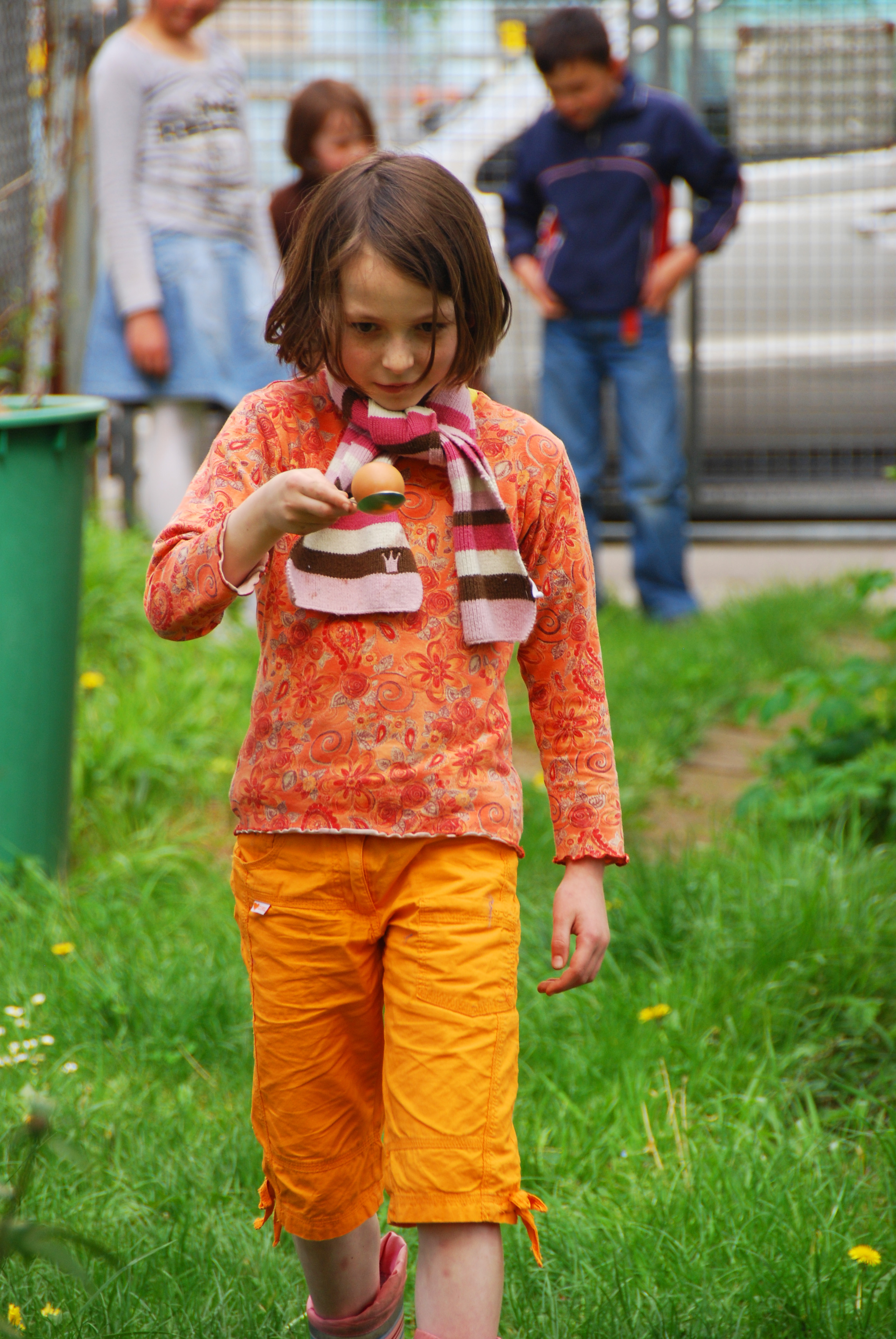 Quelle: D. Albert (Benutzer:User:Dial, eigenes Foto) Beschreibung: Eierlaufen. Autor: D. Albert Date: Mai 2008 Einverständnis des Models vorhanden.